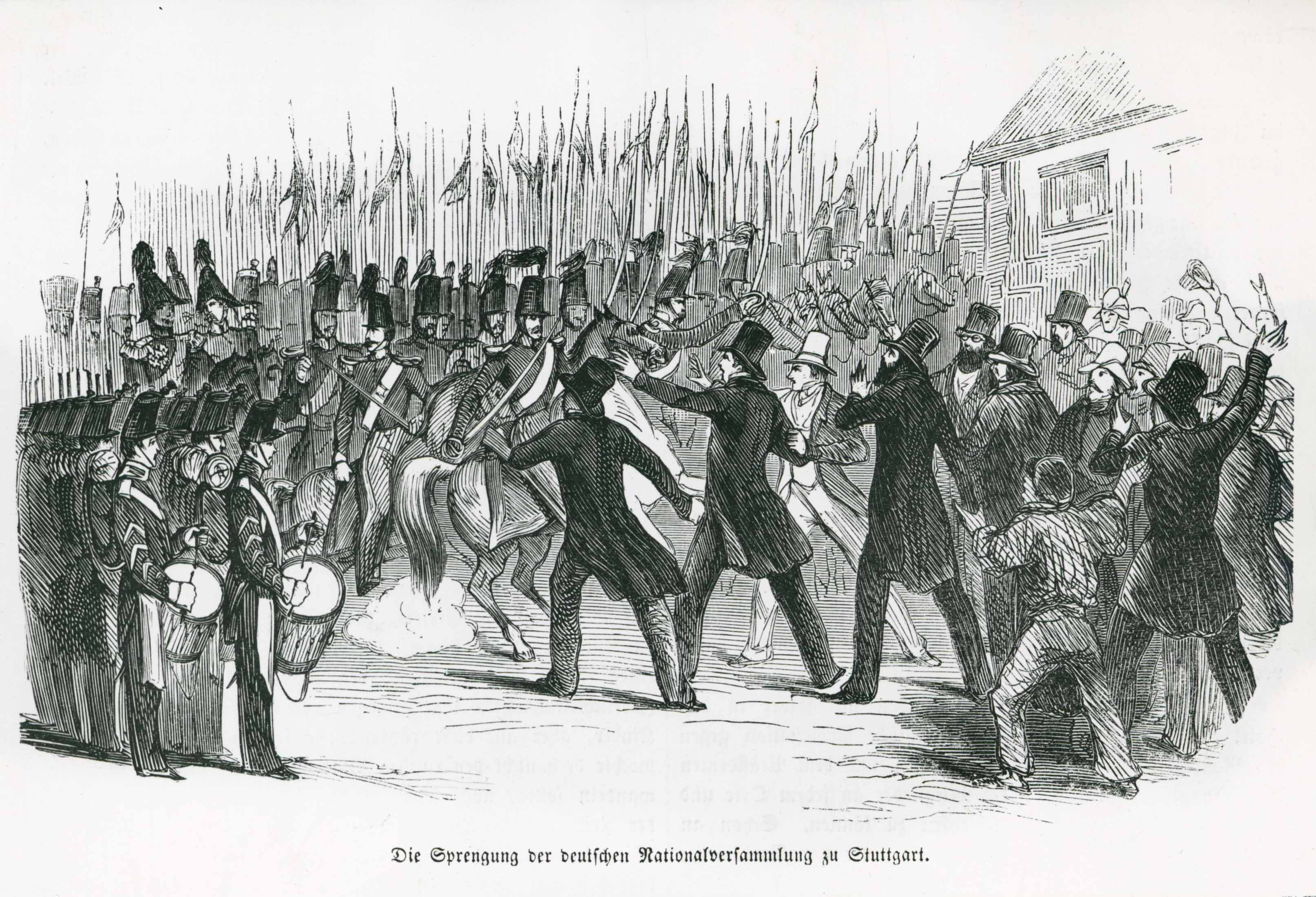 Die Sprengung der deutschen Nationalversammlung zu Stuttgart (Württembergisches Militär im Einsatz gegen das Rumpfparlament), 1849 (HStAS J 302 Nr. 5)